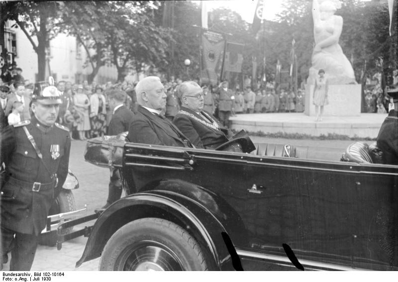 Title: Mainz, Hindenburg und Oberbürgermeister Külp People in the image: Külb, Karl M. Prof. Dr. med.: Oberbürgermeister von Mainz, Deutschland (GND 11659070X) Hindenburg, Paul von Beneckendorff und von: Reichspräsident, Generalfeldmarschall, Deutschland (GND 118551264) Factual corrections and alternative descriptions are encouraged separately from the original description. Additionally errors can be reported at this page to inform the Bundesarchiv. Original historic description: Der jubelnde Empfang des Reichspräsidenten von Hindenburg in Mainz! Reichspräsident von Hindenburg mit dem Mainzer Oberbürgermeister Dr. Külp.